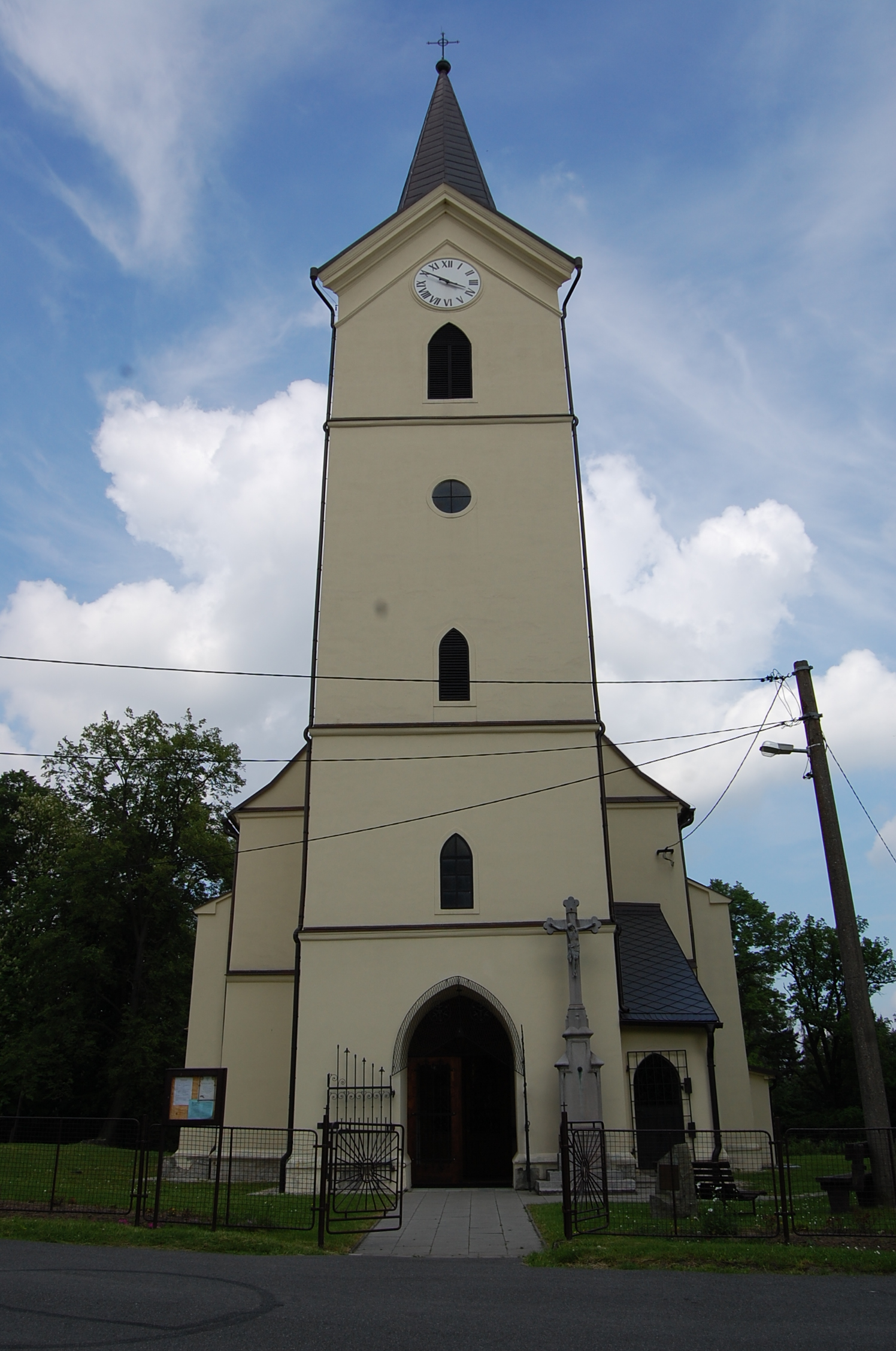 Kostel svaté Anny v Rychvaldě, okres Karviná. Západní průčelí